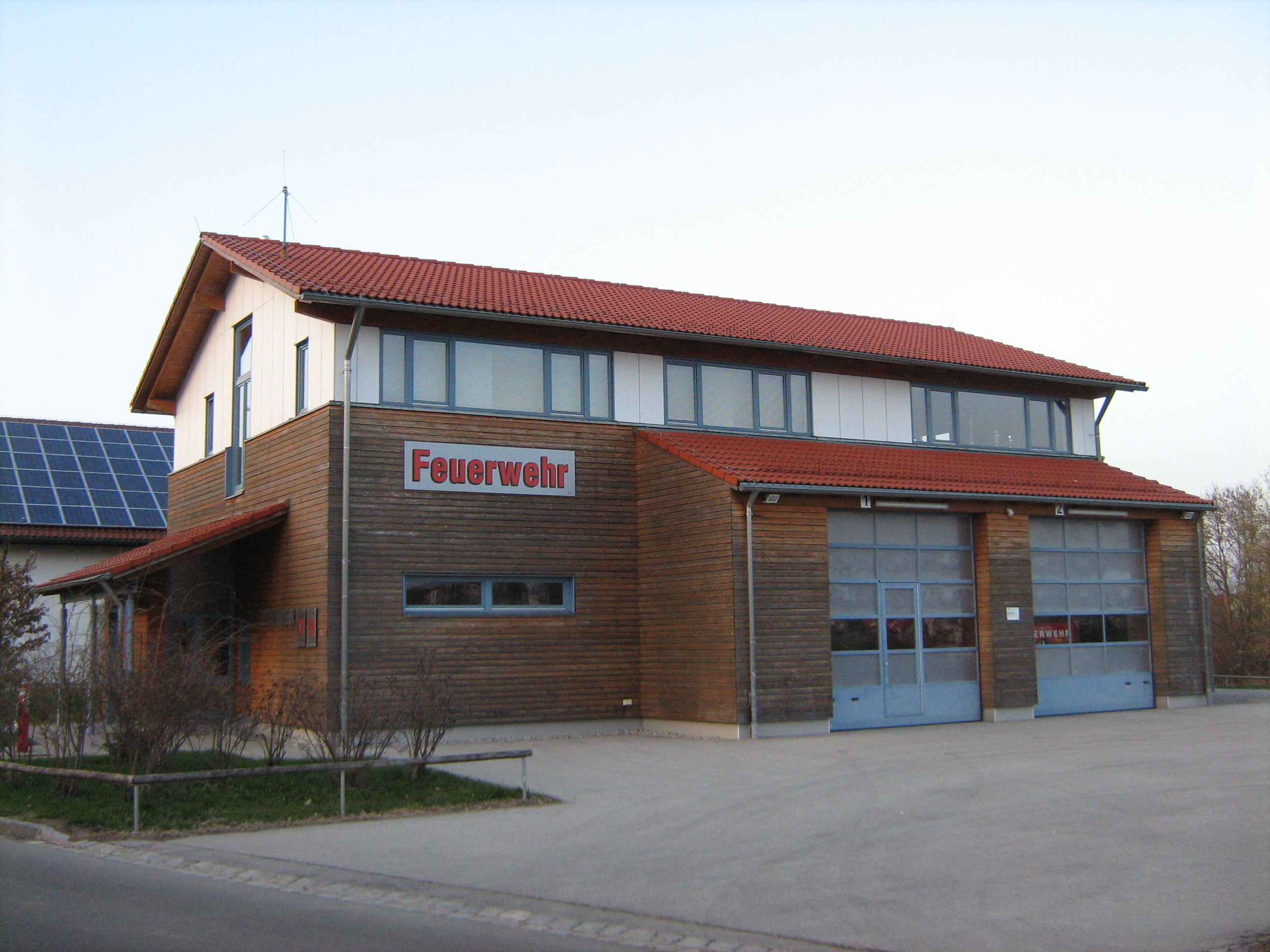 Feuerwehr Geraetehaus 1990er in Oberbeuren